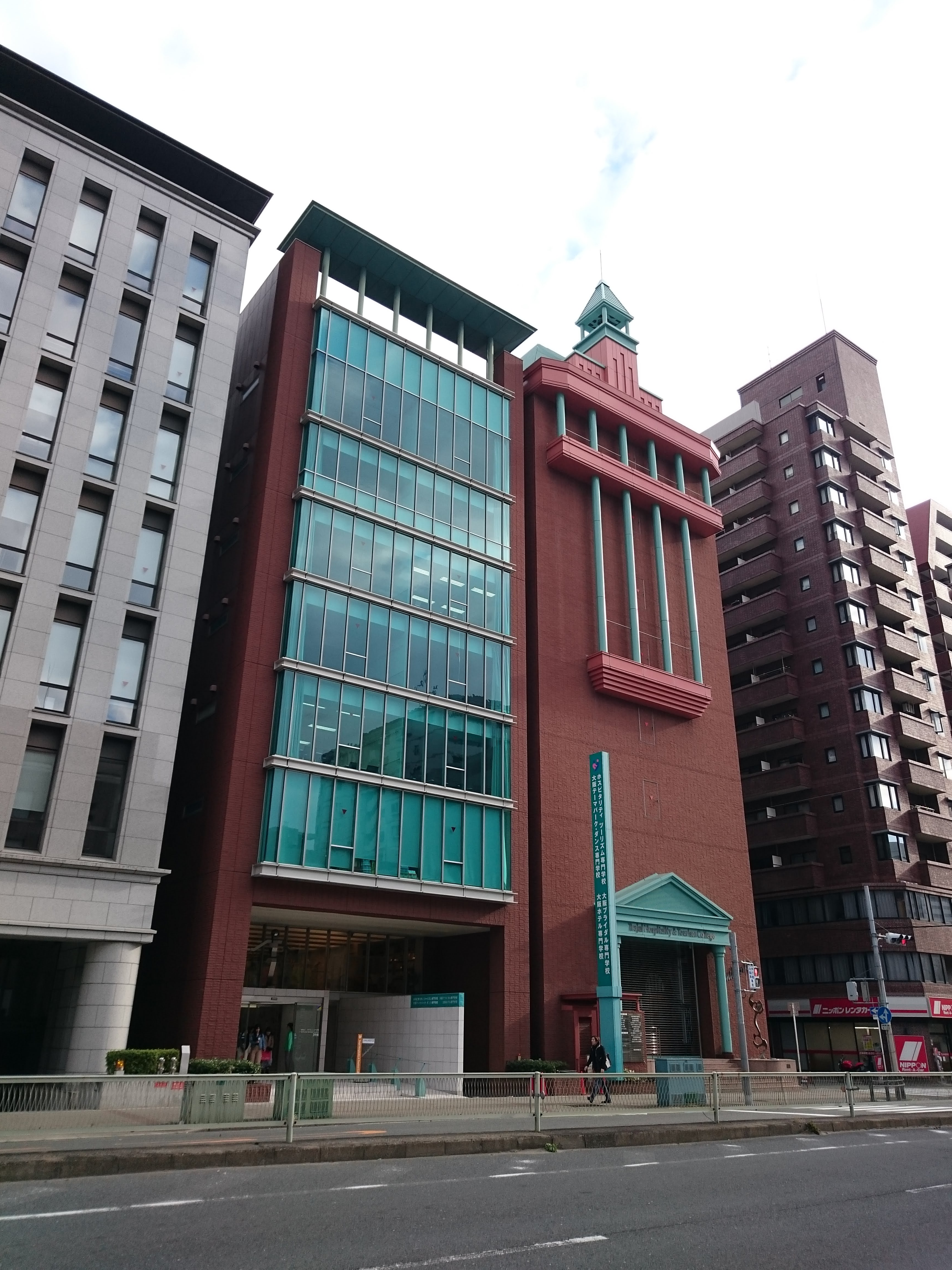 ホスピタリティツーリズム専門学校大阪の校舎外観